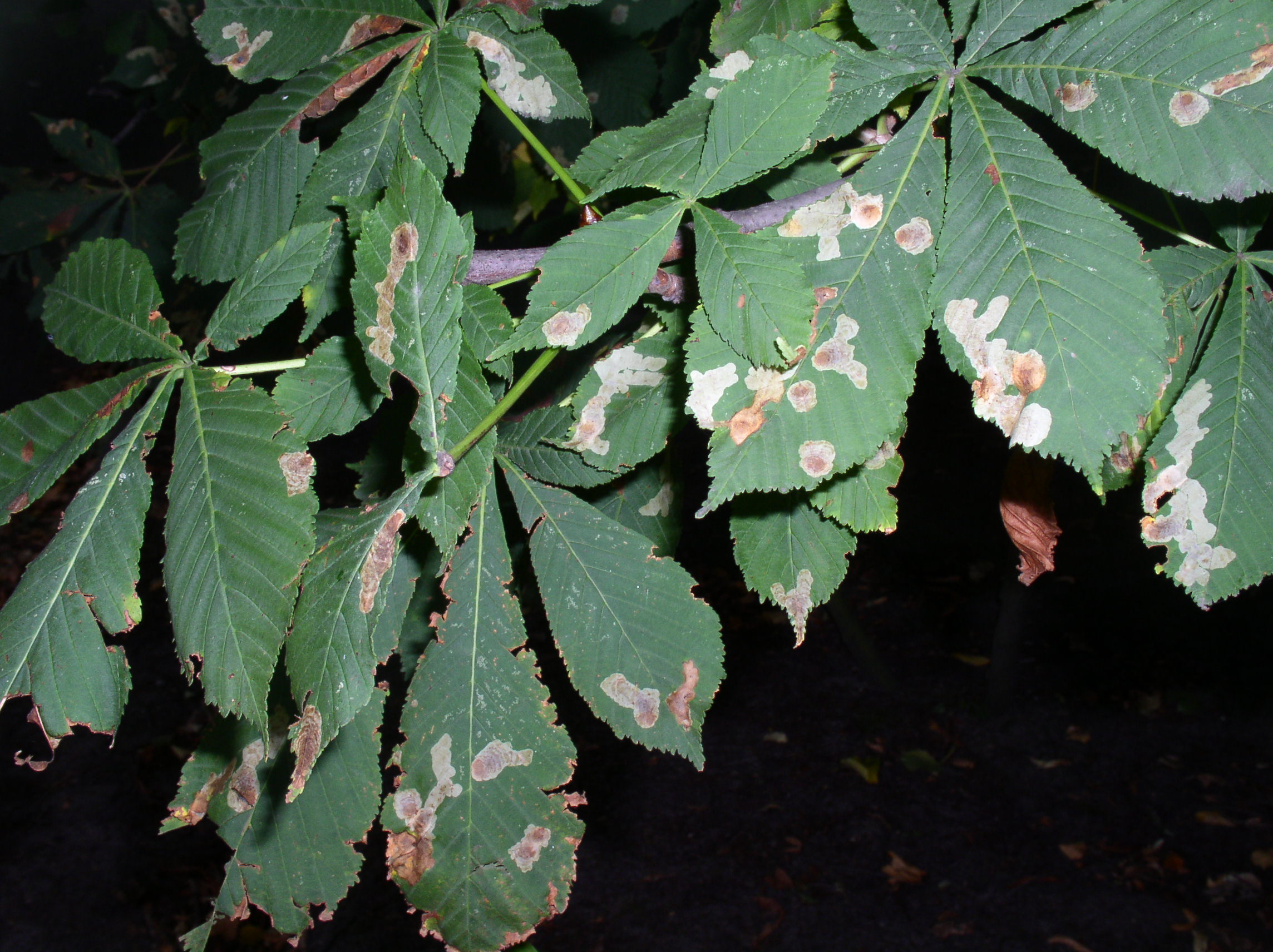 Blätter der Rosskastanie, geschädigt durch die Kastanienminiermotte, fotografiert von Benutzer:Necrophorus, GNU FDL